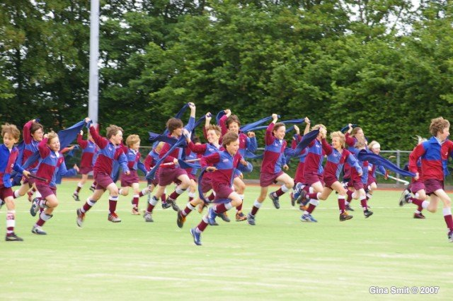 Wie de jeugd heeft heeft de toekomst